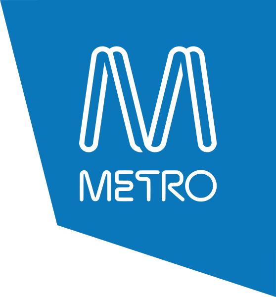 Logotipo de Metro Trains Melbourne